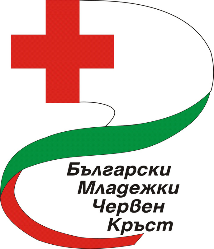 Лого на Български младежки Червен кръст